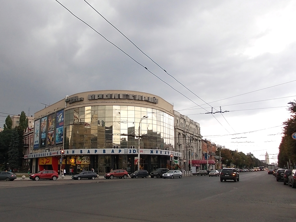 Кинотеатр "Пролетарий" в Воронеже